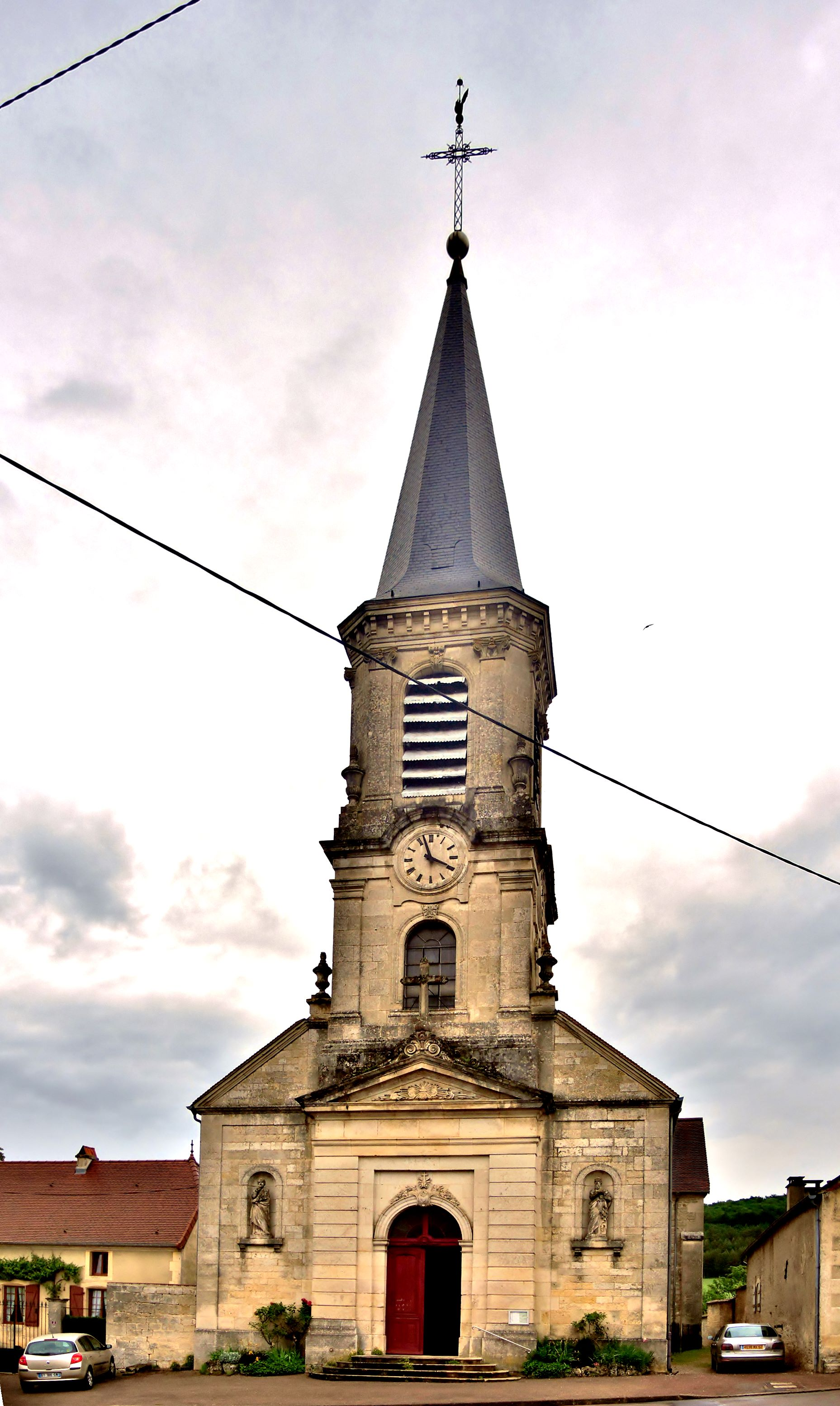 Façade et clocher de l'église sainte Anne d'Auberives. Haute-Marne